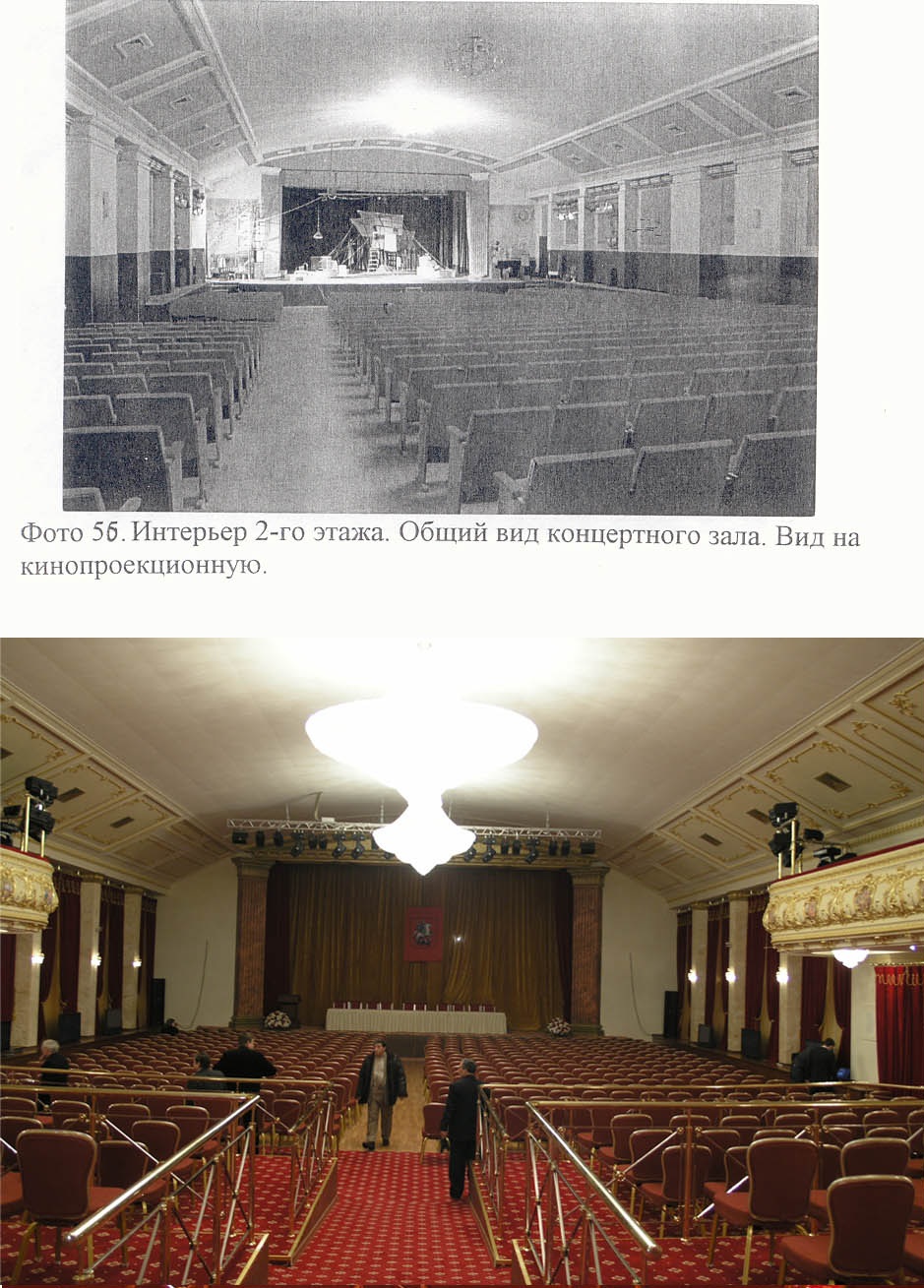 Клуб фабрики "Свобода" (Внутренние помещения. Сцена.) до реставрации "Интэс"